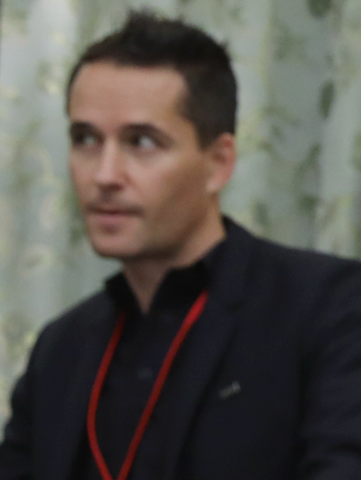 蔡英文總統今（16）日下午接見參加「2017臺灣自行車登山王挑戰」活動國際知名選手卡德‧伊文斯（Cadel Evans），期盼透過自行車運動，增進臺灣與世界的聯結。